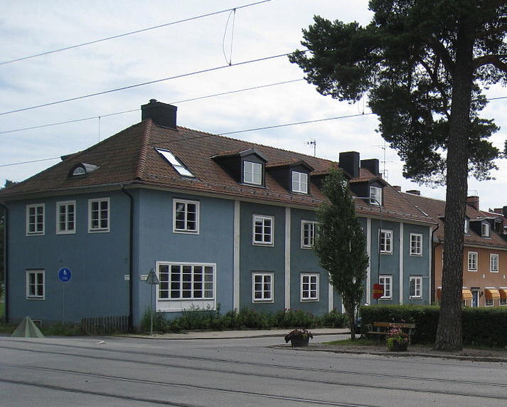 Smedslättstorget, Bromma, Stockholm. Det blåputsade huset ligger i kvarteret Paddan i korsningen Smedslättstorget 43 och Andersens väg.